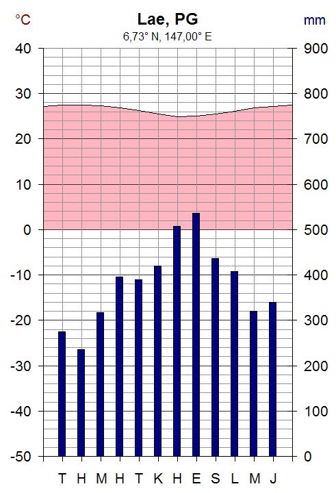 Laen ilmastodiagrammi.